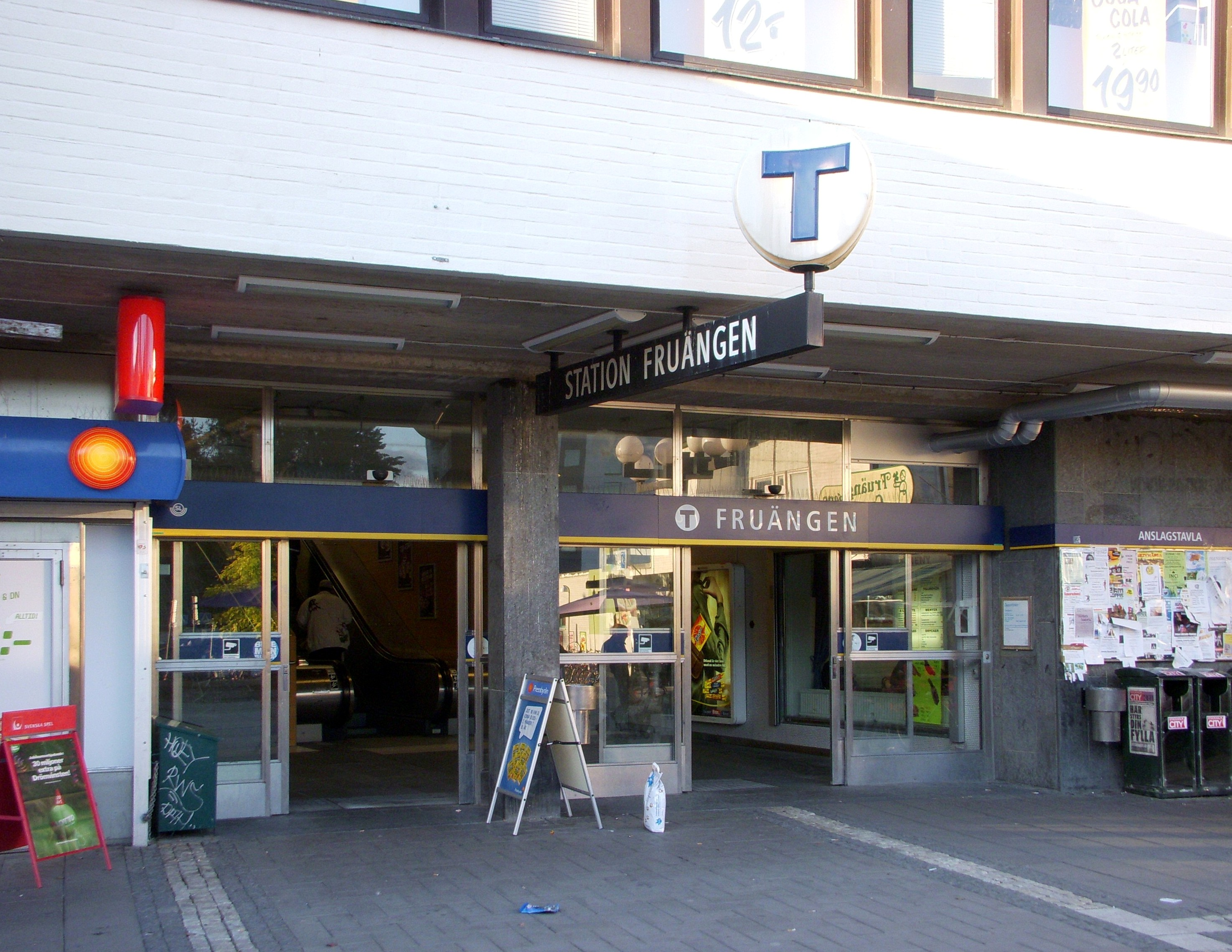 Fruängen och T-bana ingången från torget